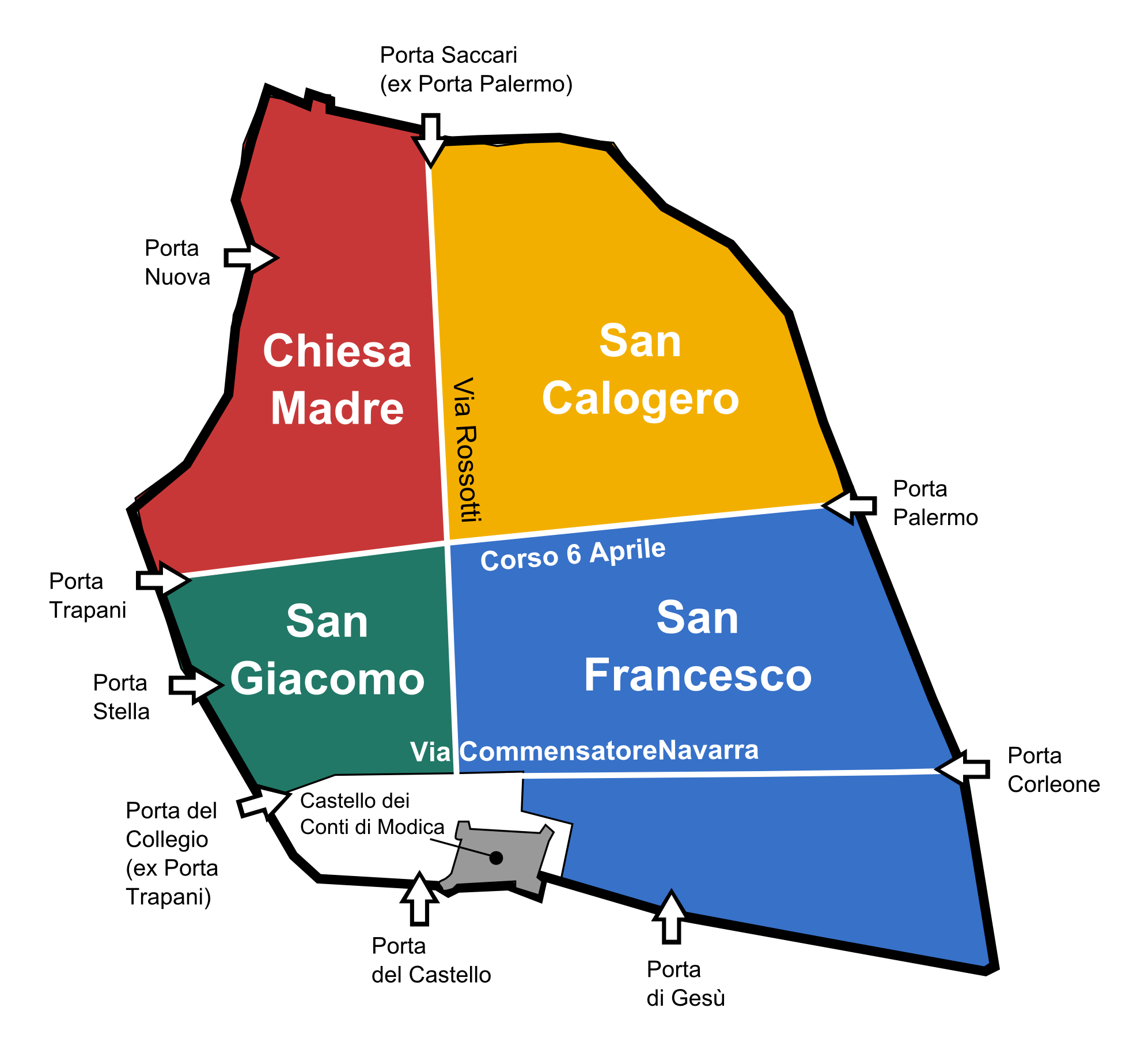 Ricostruzione della mappa del centro storico di Alcamo intorno al secondo quarto del XVIII secolo secondo le ipotesi dell'architetto Ignazio Longo (i nomi delle vie sono quelli attuali). Fonte: Sfondo tratto da OpenStreetMap